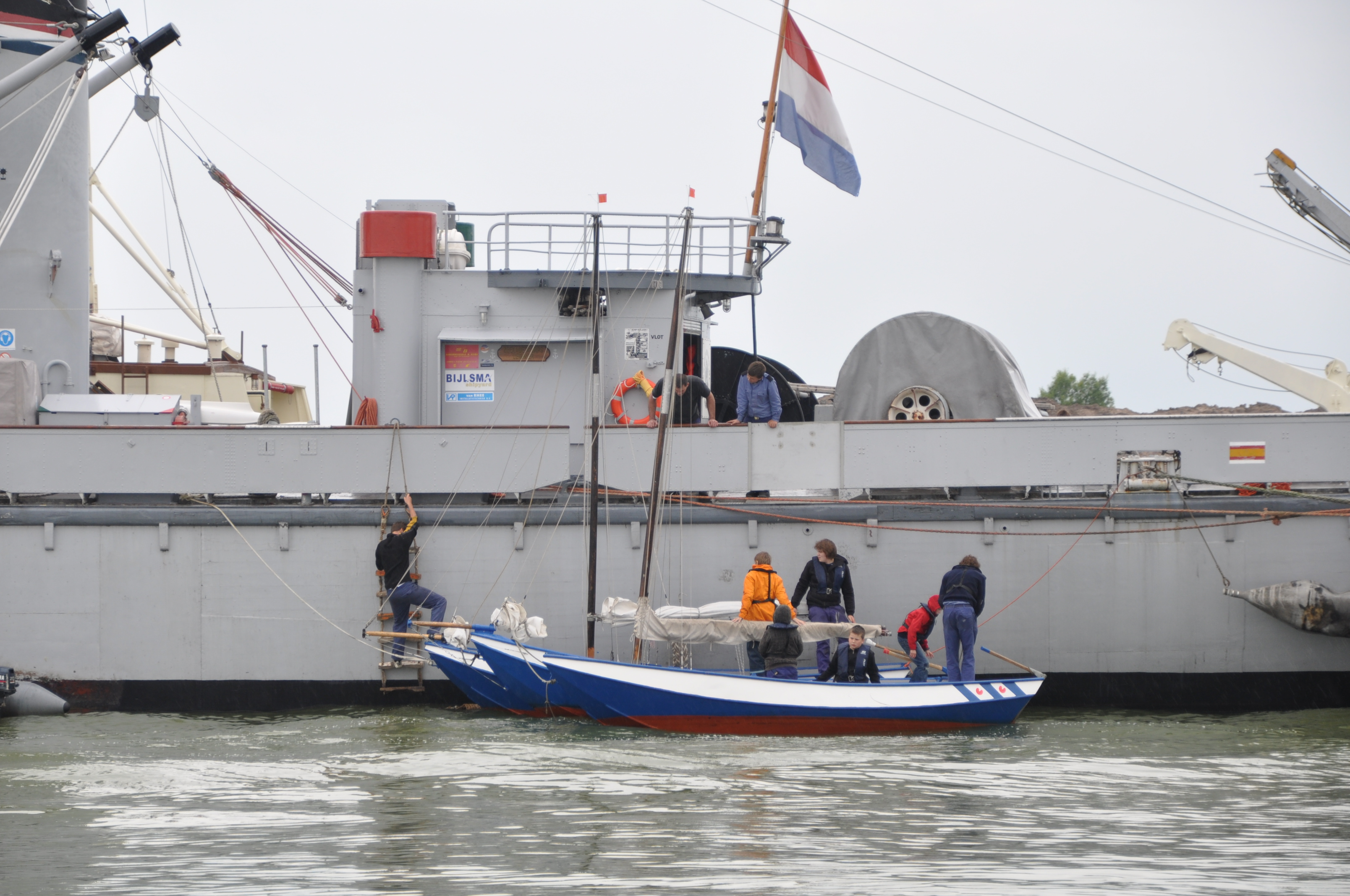 De Roermond voor de sluis Lemmer voor anker